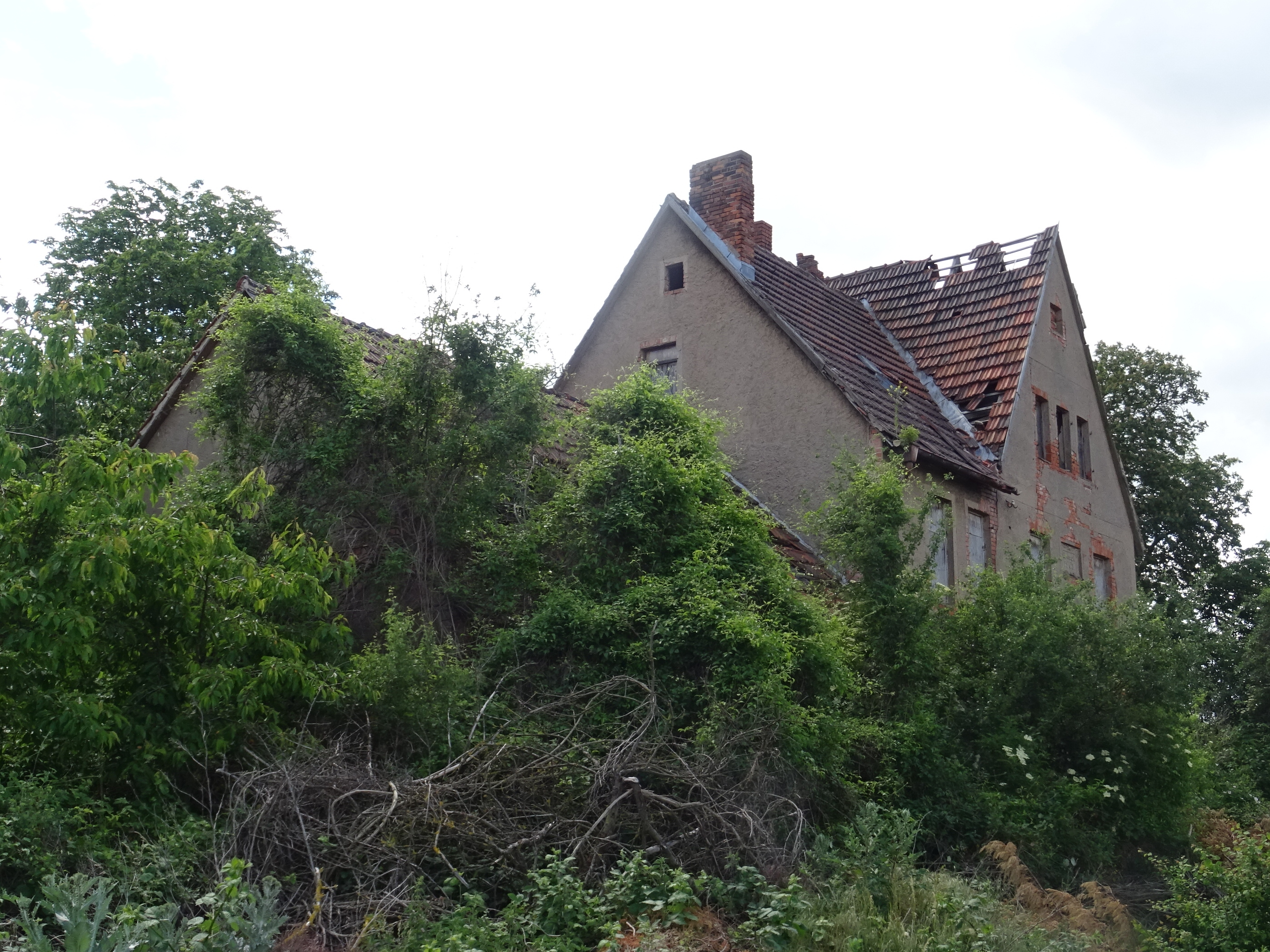 Bahnhof Beesenlaublingen, frühere Gleisseite